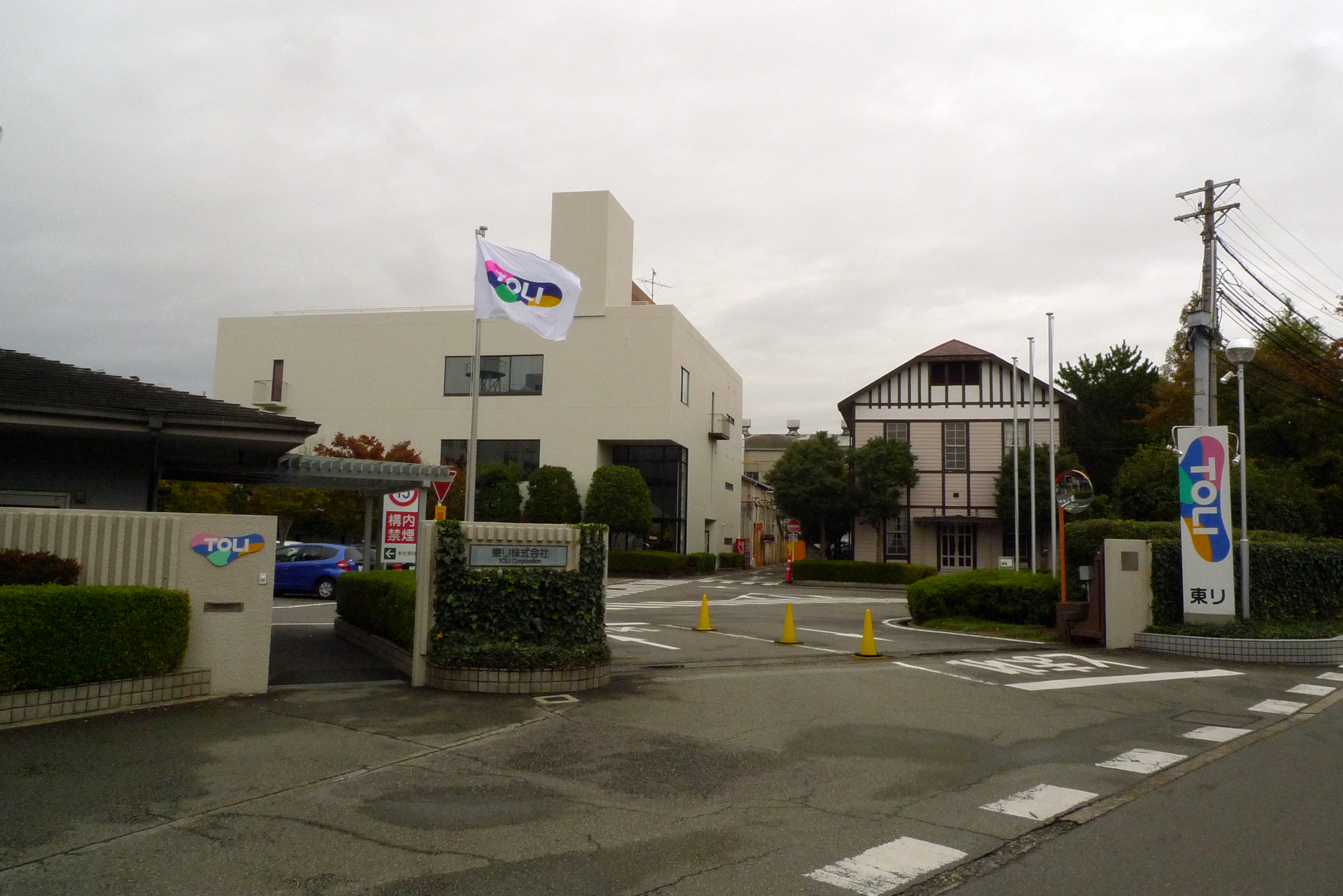 東リ株式会社本社